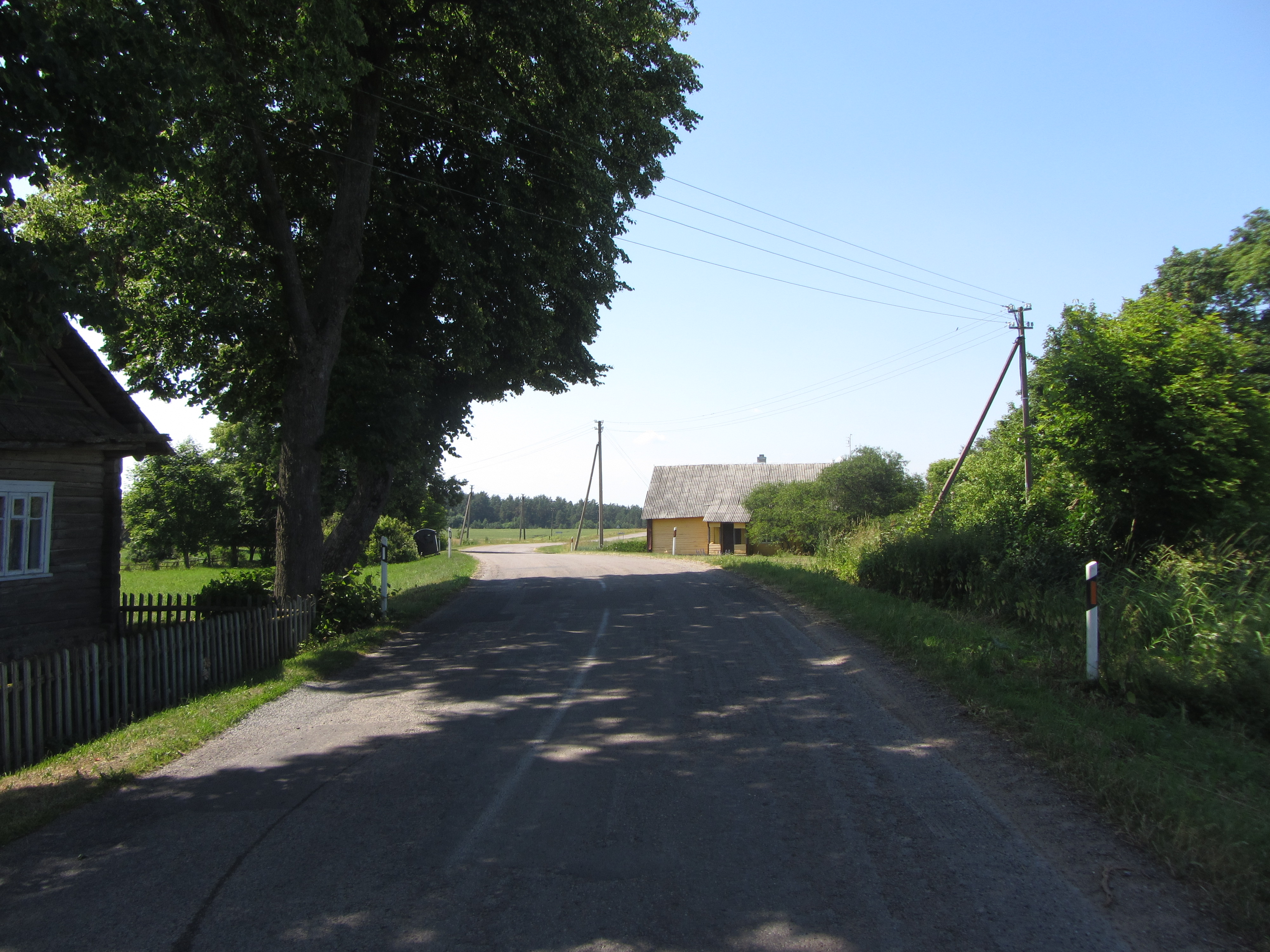 Lyduokių sen., Lithuania